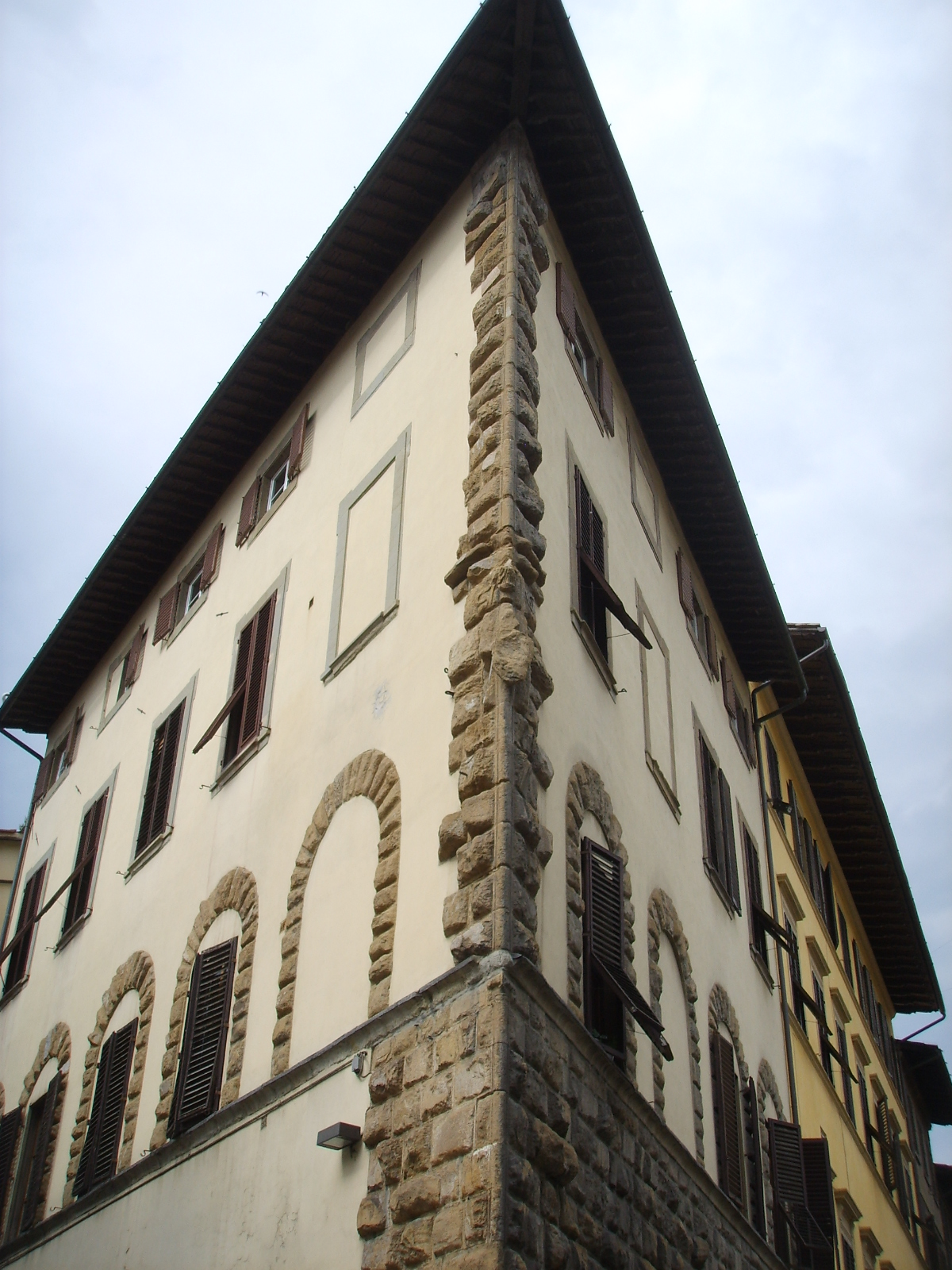 Casa guidi, spigolo